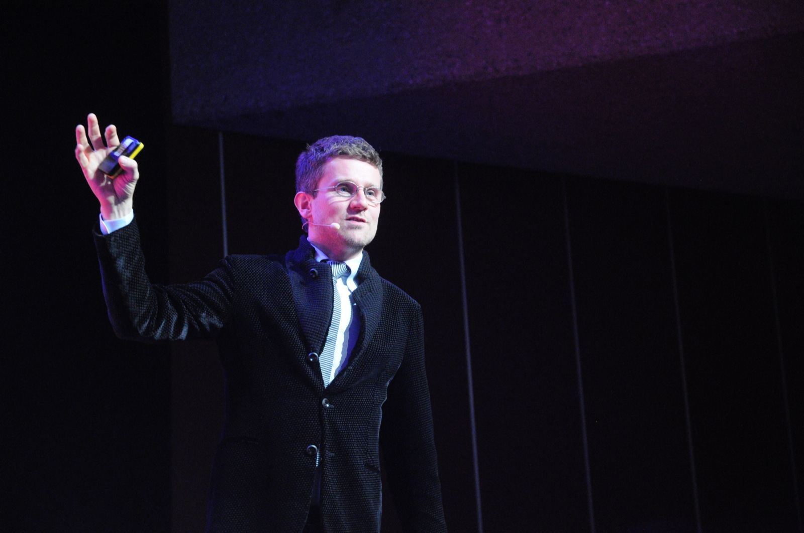 by